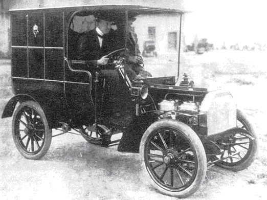 Erste ungarische Auto von János Csonka 1905